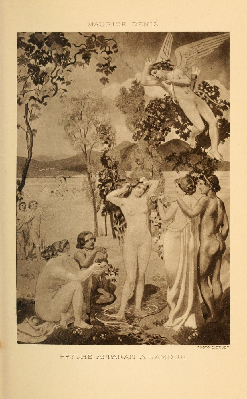 Photographie du tableau de Maurice Denis, "Psyché apparaît à l´amour", cliché réalisé par Eugène Druet